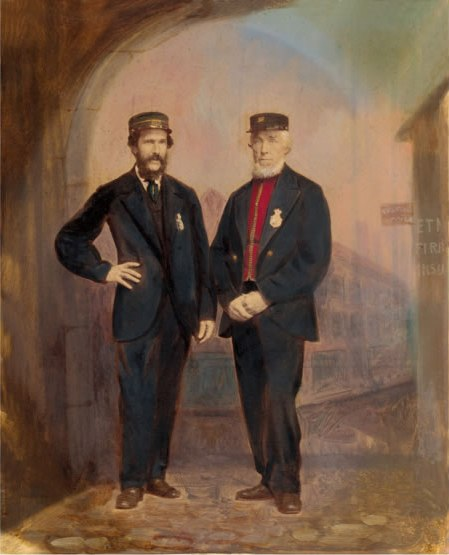 Alexander Bertram, William Patton